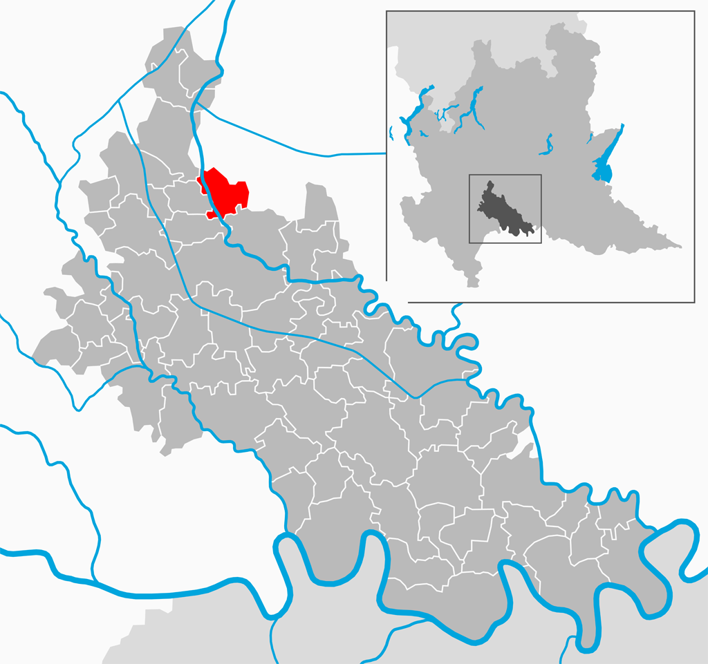 Il comune di Boffalora d’Adda nella provincia di Lodi